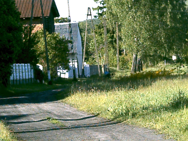 Bukowa, droga przez wieś